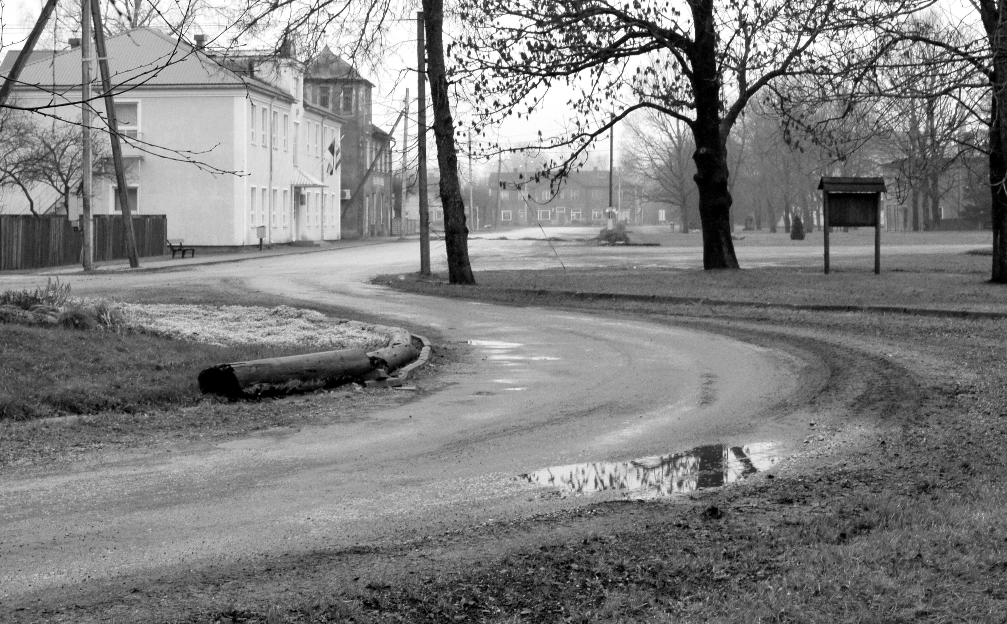 Moisakula